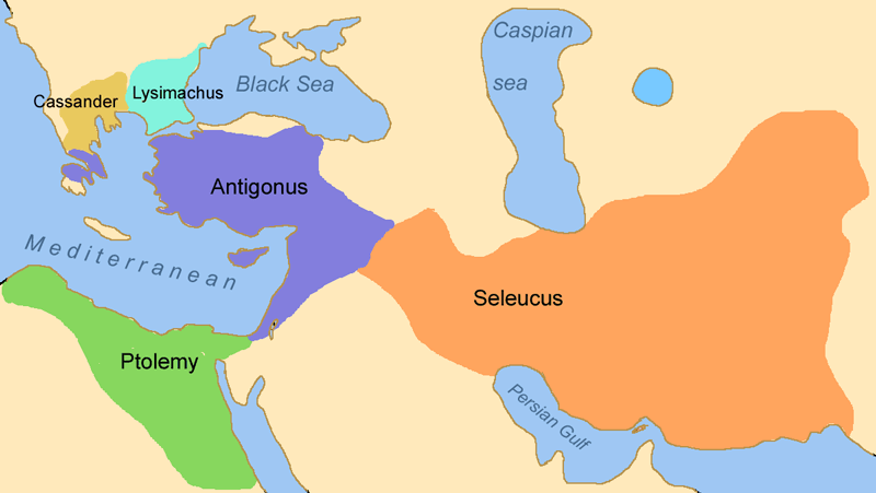 A parte herdade e governada por Seleuco I Nicator